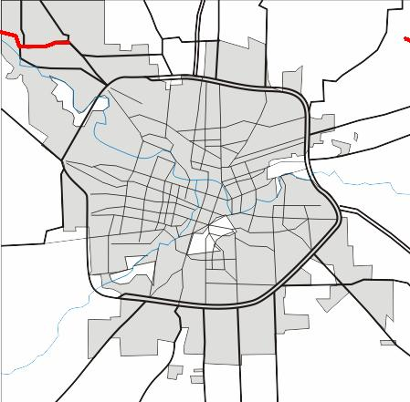 Ubicación de la avenida en Córdoba.